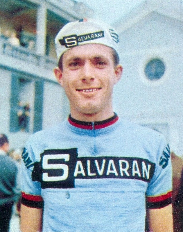 Figurina Campioni dello Sport Panini 1966 n.203 "Luciano Armani"